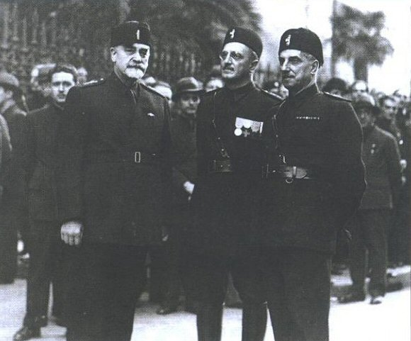 Il direttorio della Banca d'Italia nel 1937